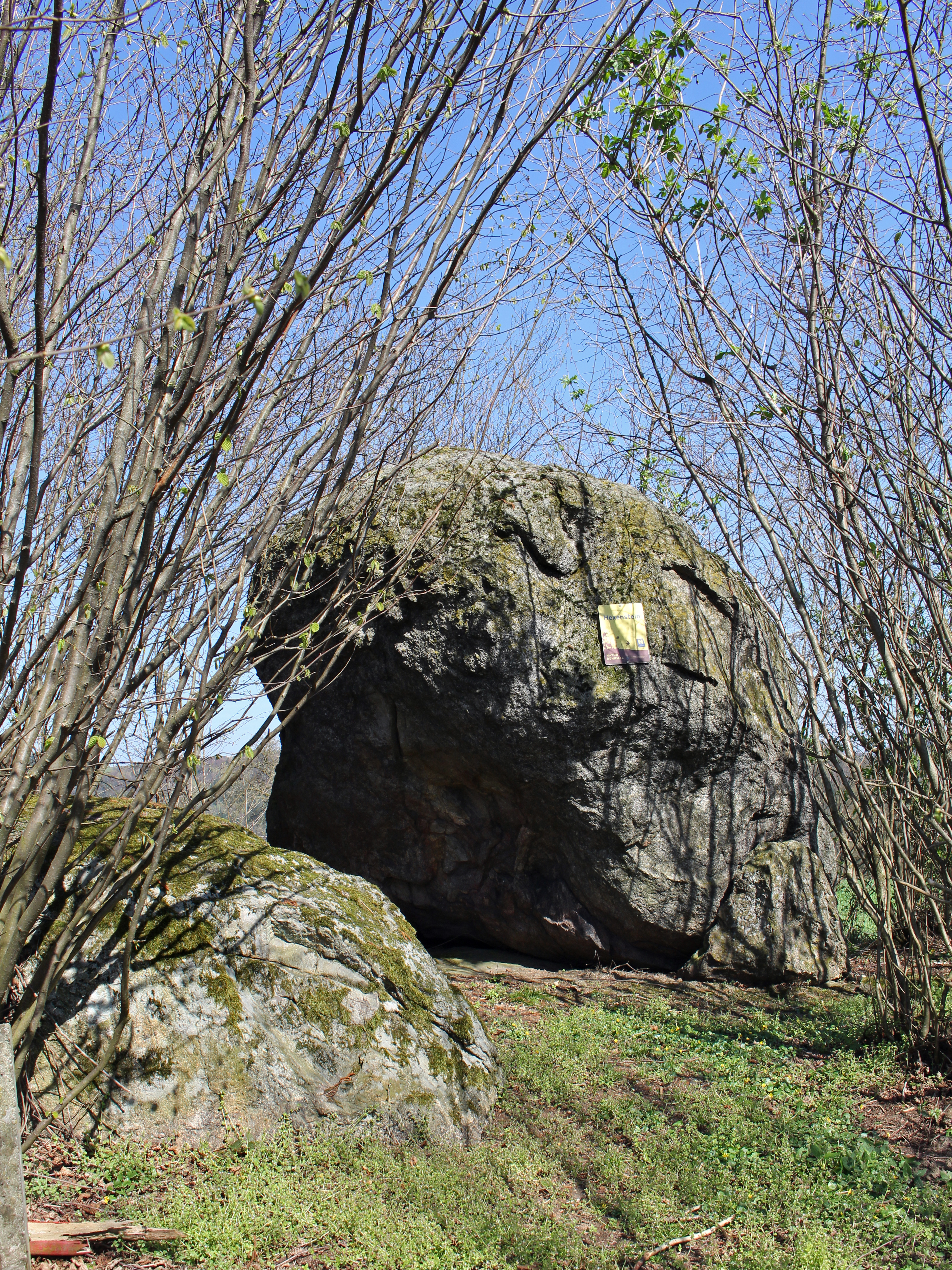 Hexenstein Naturgebilde This media shows the natural monument in Lower Austria with the ID AM-059.